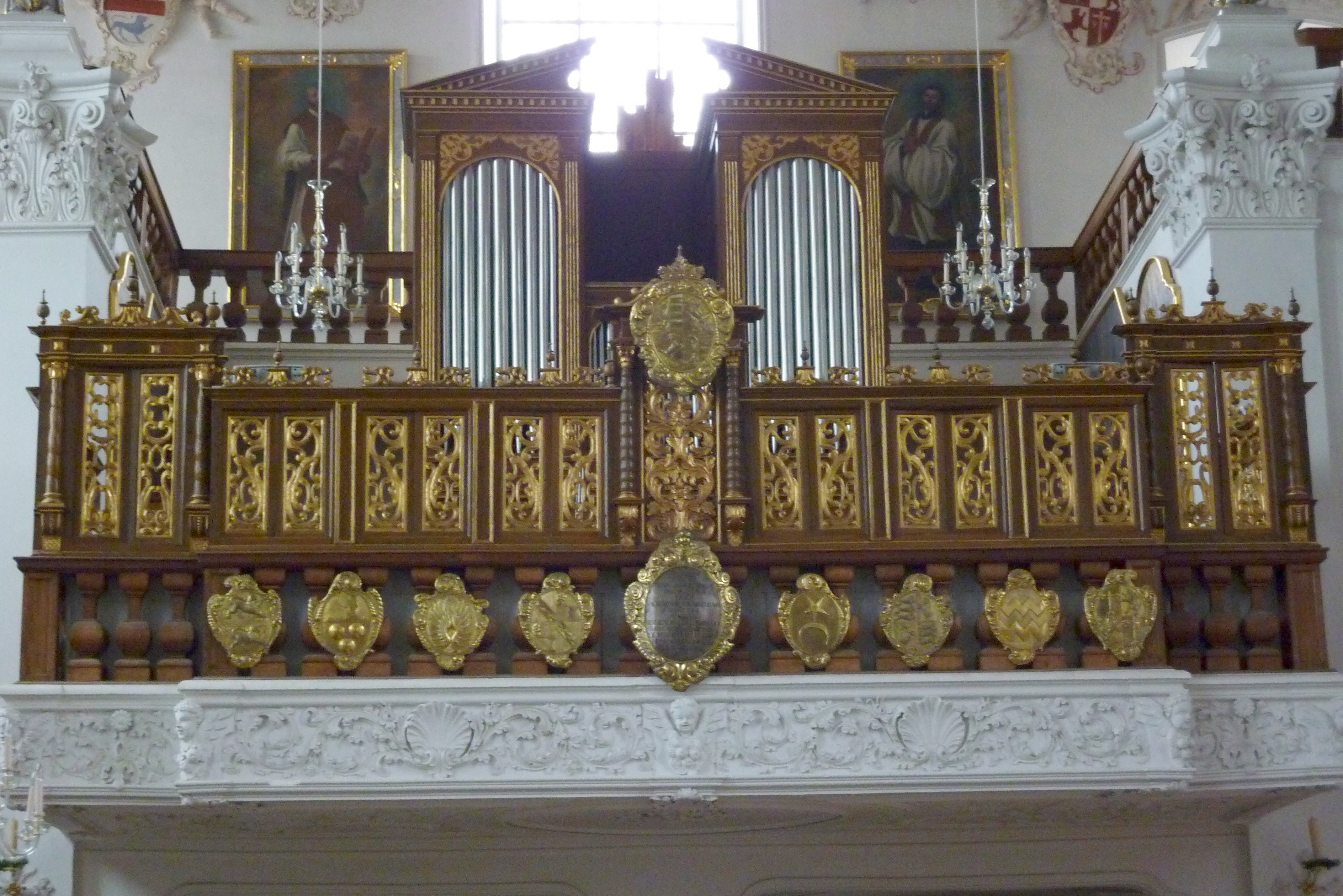 Ehemalige Damenstiftskirche, katholische Pfarrkirche St. Johannes Baptist und Johannes Evangelist in Edelstetten in der Gemeinde Neuburg an der Kammel im Landkreis Günzburg (Bayern), Orgelempore, ehemaliger Chor der Stiftsdamen, Messingkartuschen mit Wappen, Holzgitter um 1670 von Daniel Dietrich